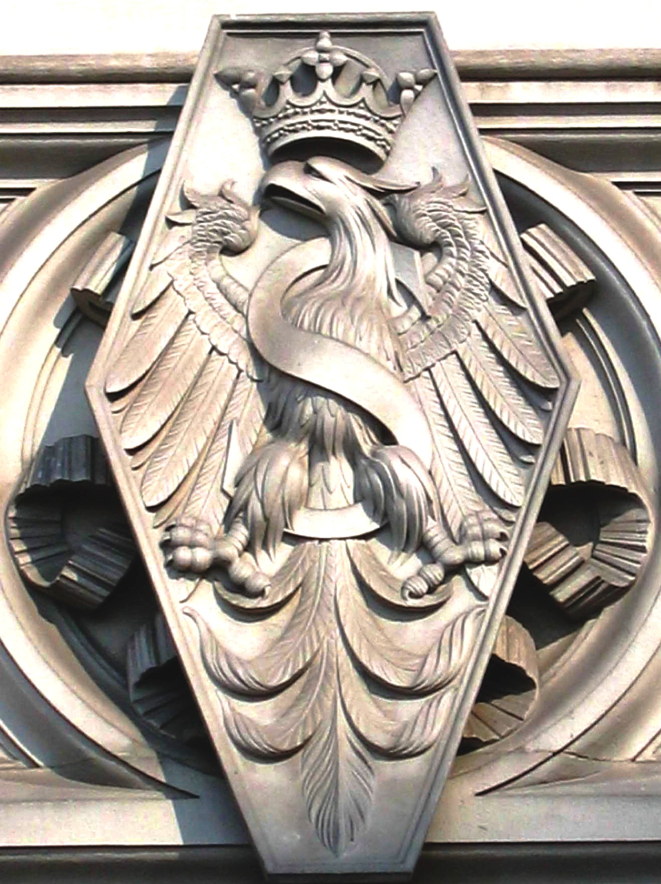 Orzeł Zygmunta Starego na Wawelu author-Maciej Szczepańczyk user-Mathiasrex